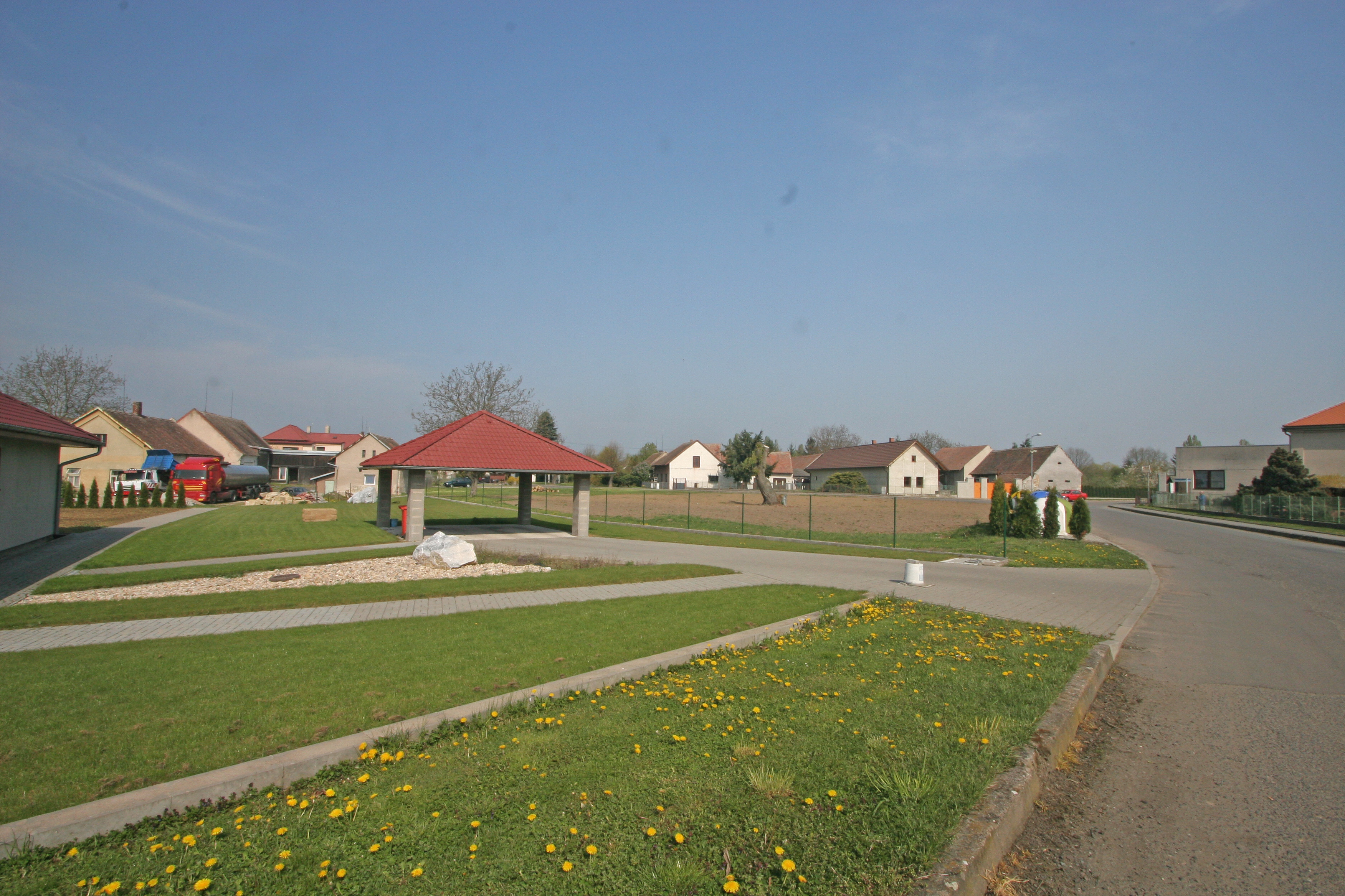 Jeníkovice náves